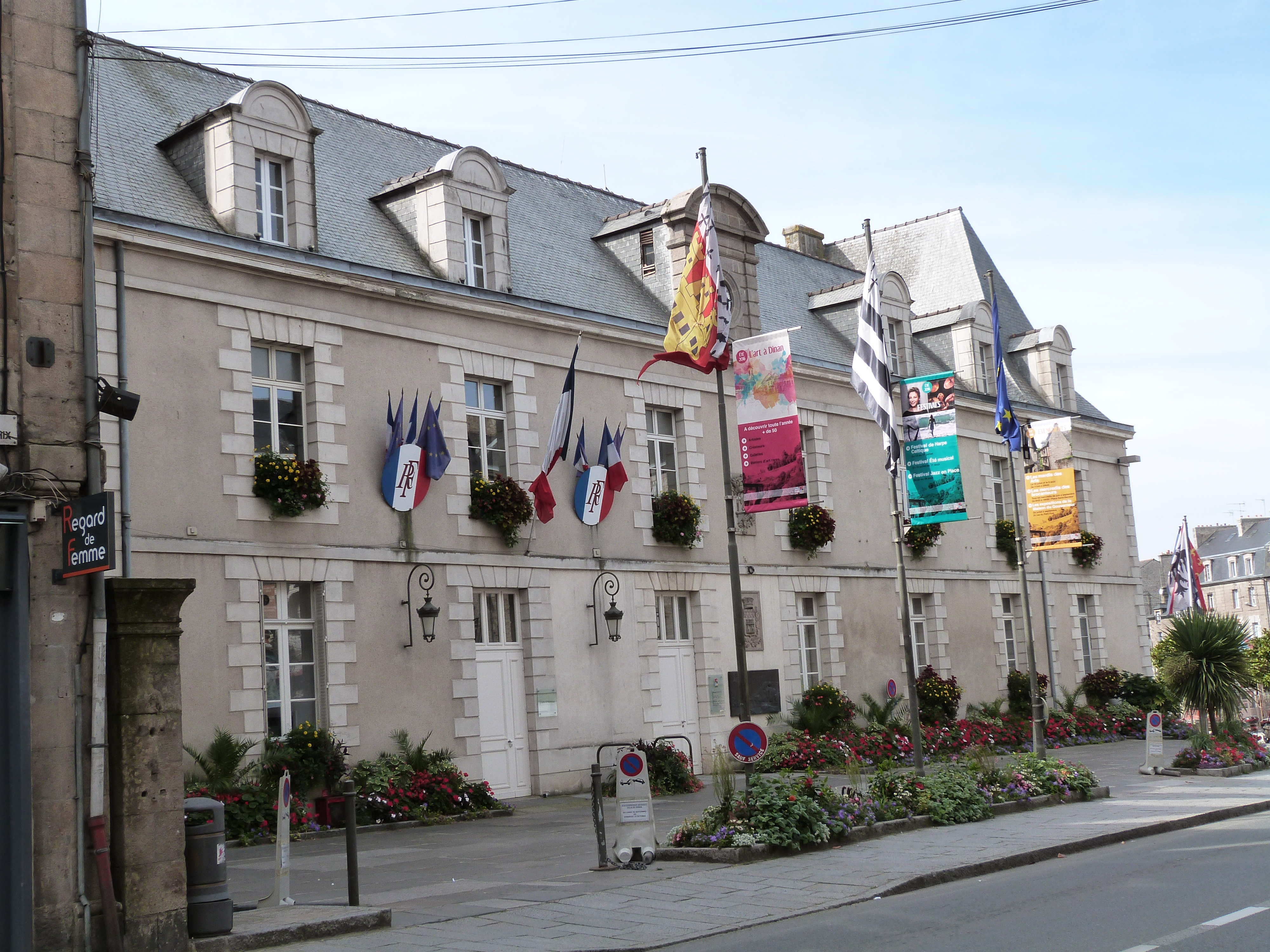 Hôtel de Ville de Dinan